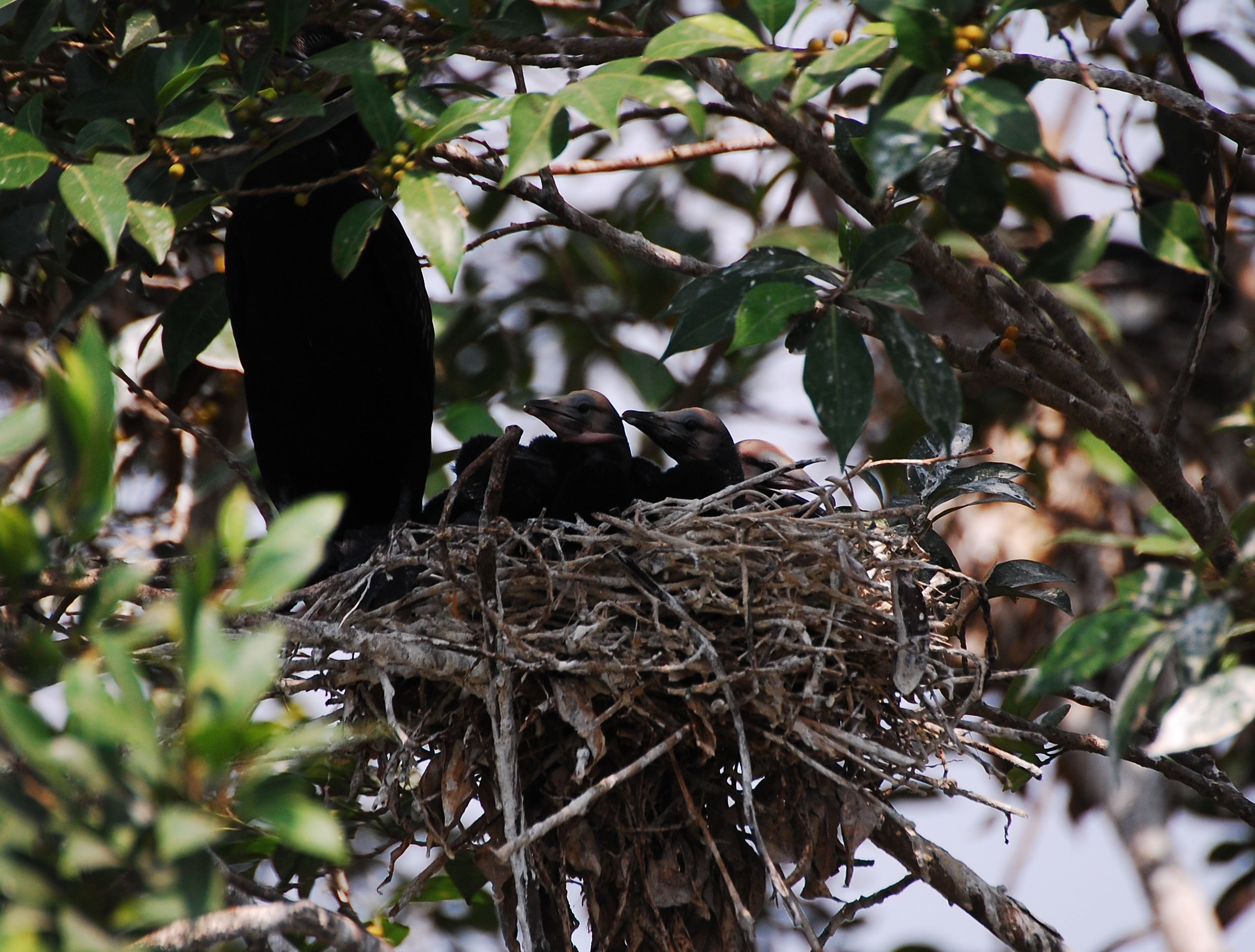 നീർക്കാക്ക‍ക്കുഞ്ഞ്